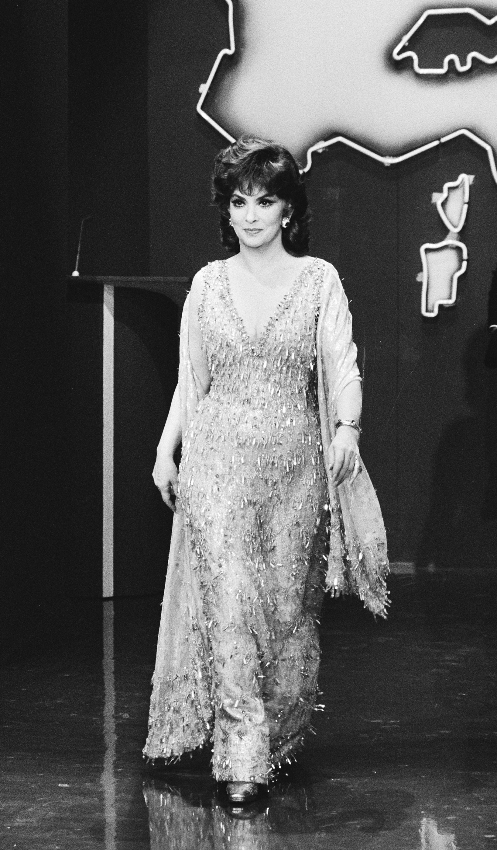 NOS televisieprogramma Europaquiz. Gina Lollobrigida